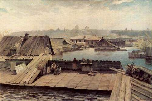 Розлив Дніпра на Оболоні: Репродукція картини Сергія Світославського «Розлив Дніпра на Оболоні», 90-і роки ХІХ століття.